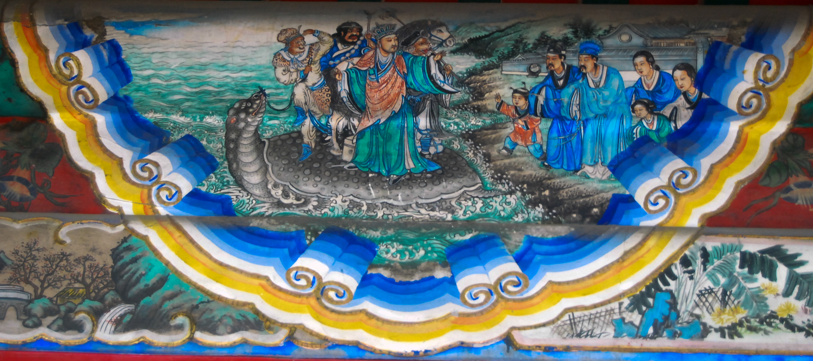 颐和园长廊彩绘：路阻通天河（西游记故事）